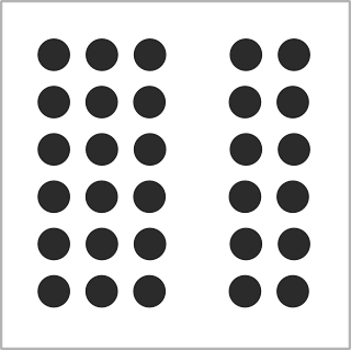 Interpretación personal de la ley de proximidad de la Gestalt